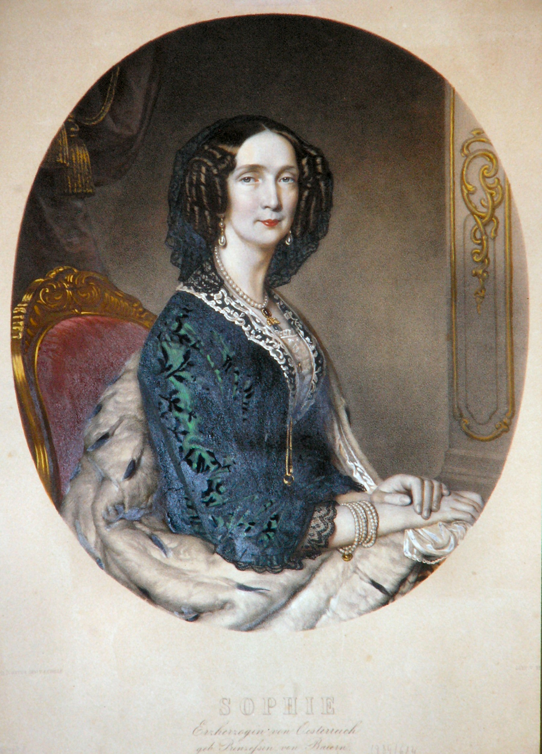 Sophie von Österreich (1805-1872), Erzherzogin von Österreich, Prinzessin von Bayern. Lithographie von Franz Eybl, ca.1860